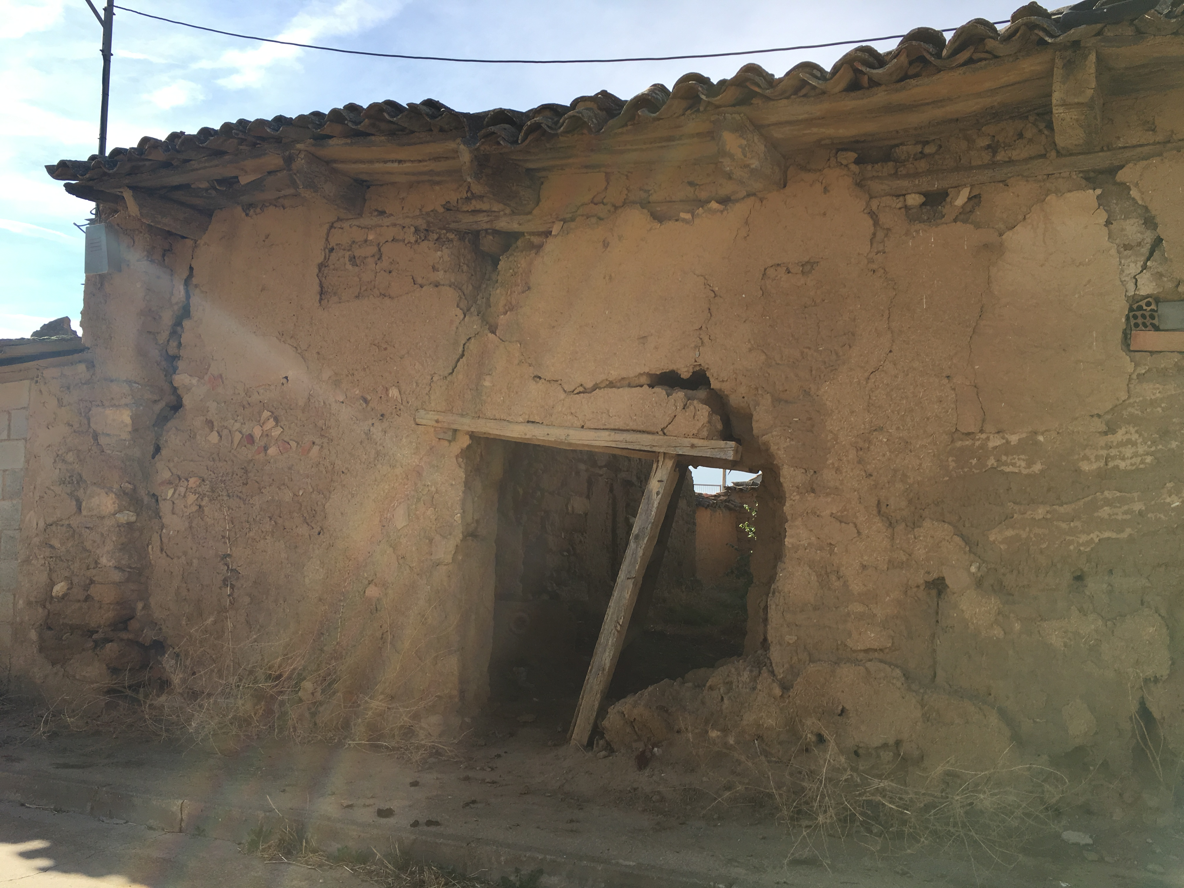 Villaesper Milenario